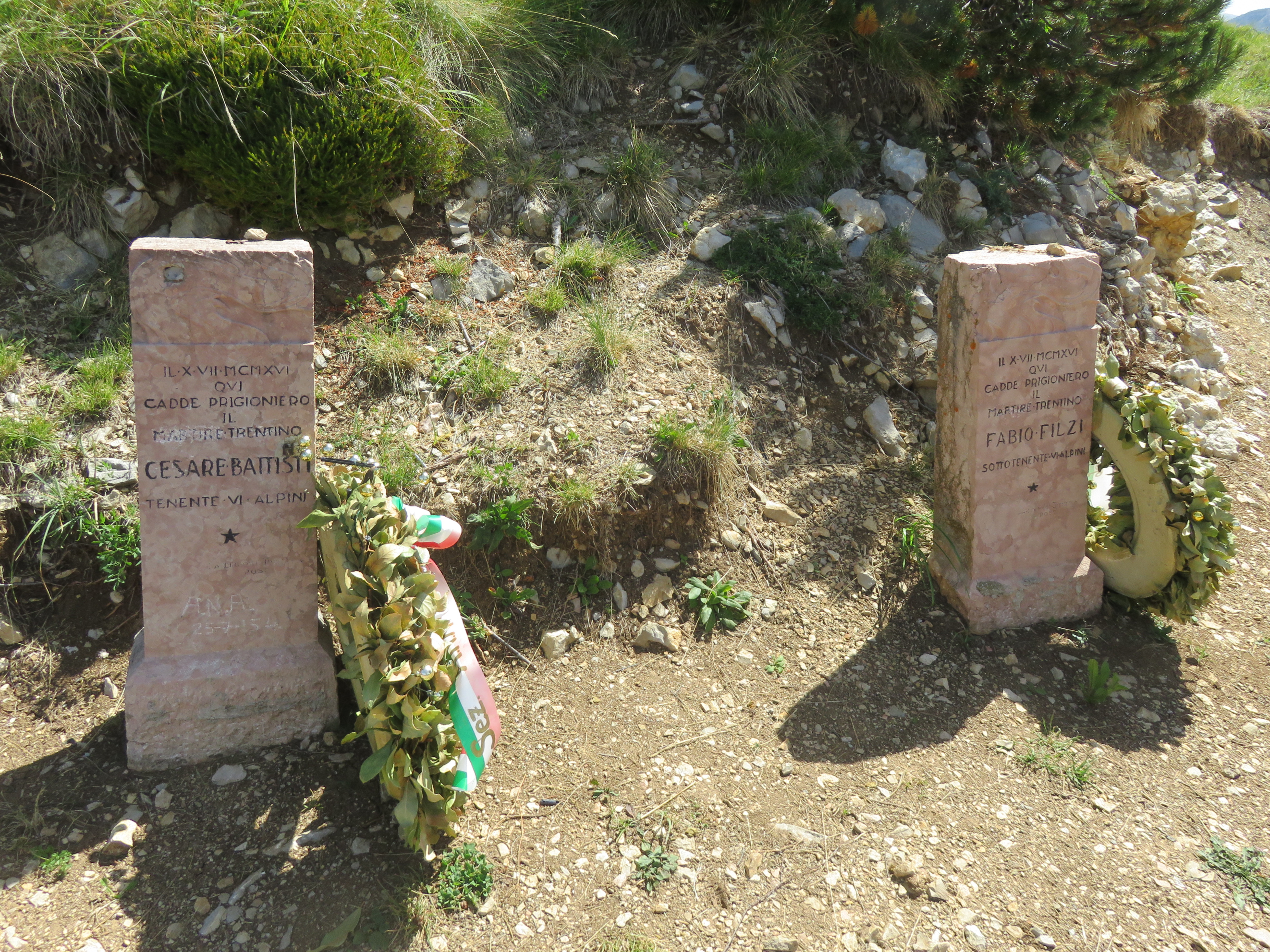 Selletta Battisti. Lapidi Cesare Battisti e Fabio Filzi